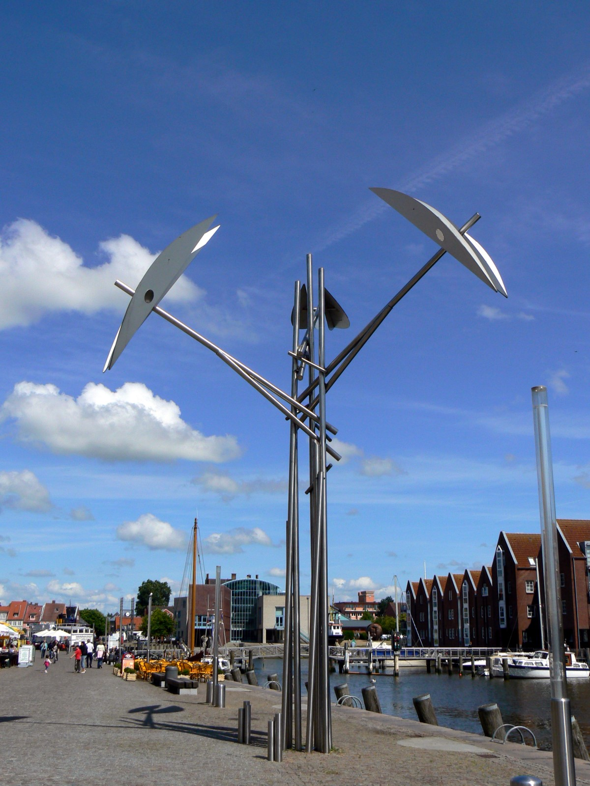 Kinetische Skulptur von Hans-Michael Kissel, 2003. Standort: Husumer Hafen.